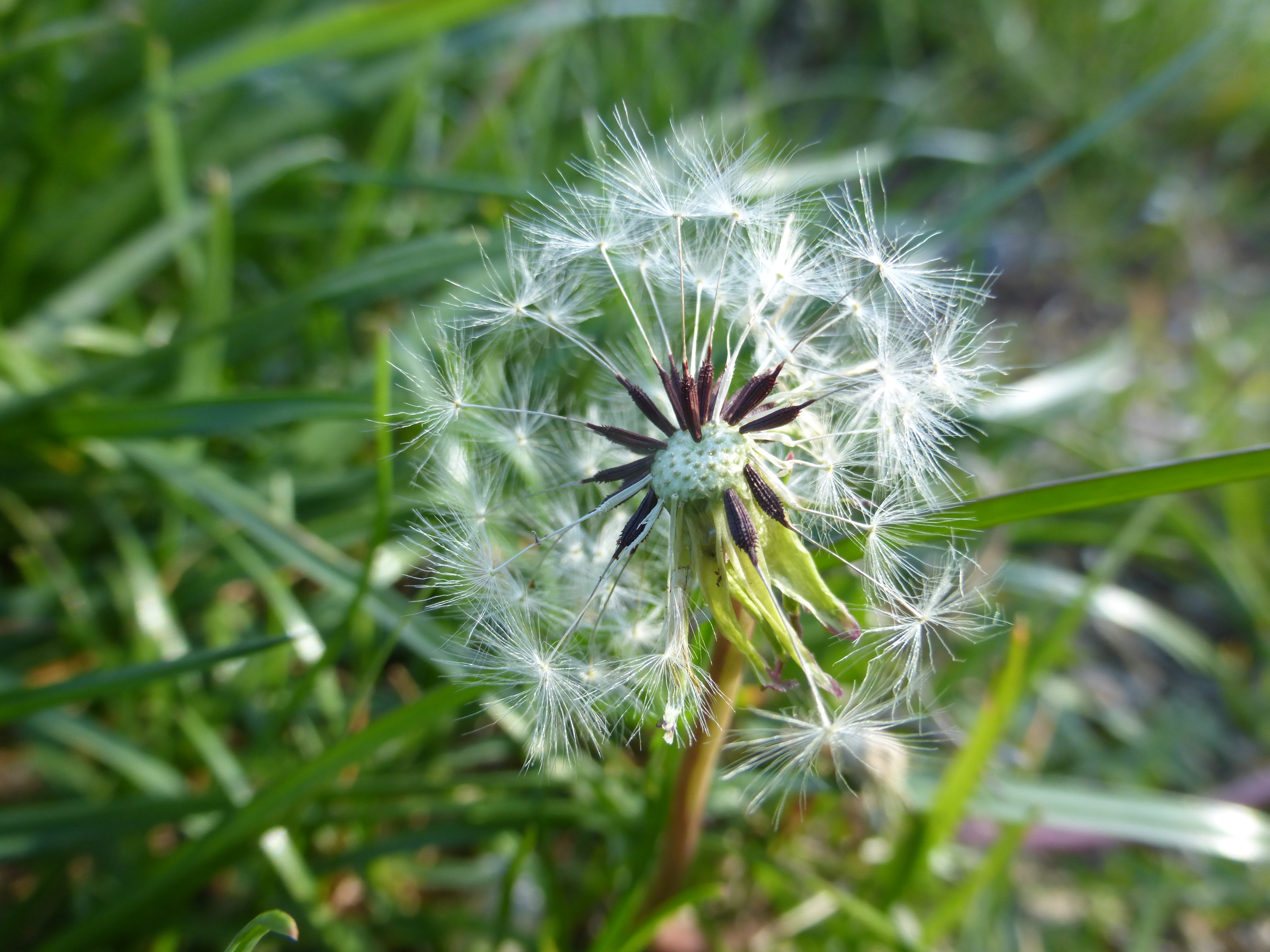 Schlesischer Löwenzahn (Taraxacum parnassicum) Cleebronn Michaelsberg 30. April 2017